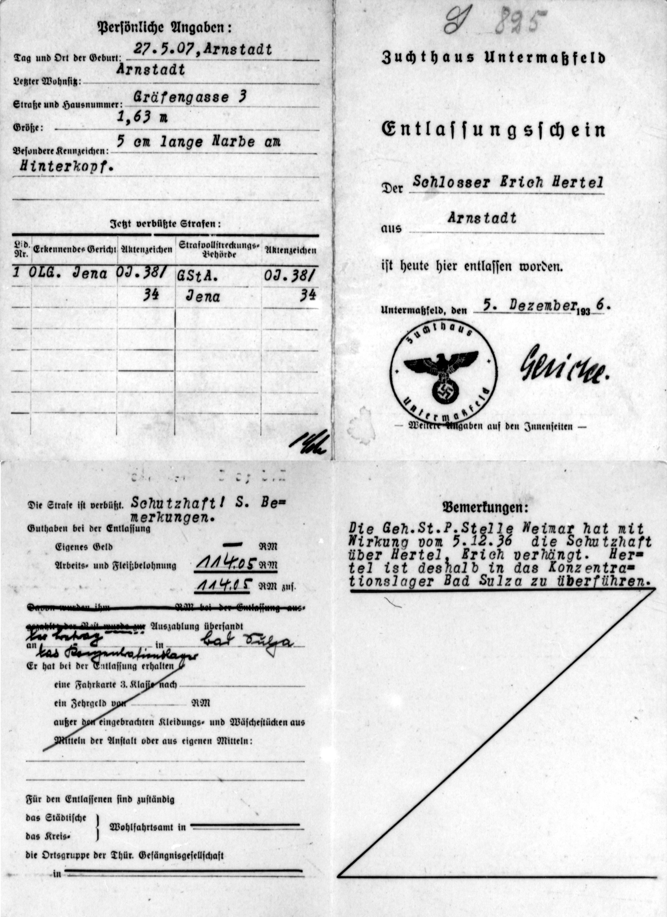 Das Bild zeigt den Entlassungsschein aus dem Zuchthaus mit der sofortigen Überstellung des Häftlings ins KZ